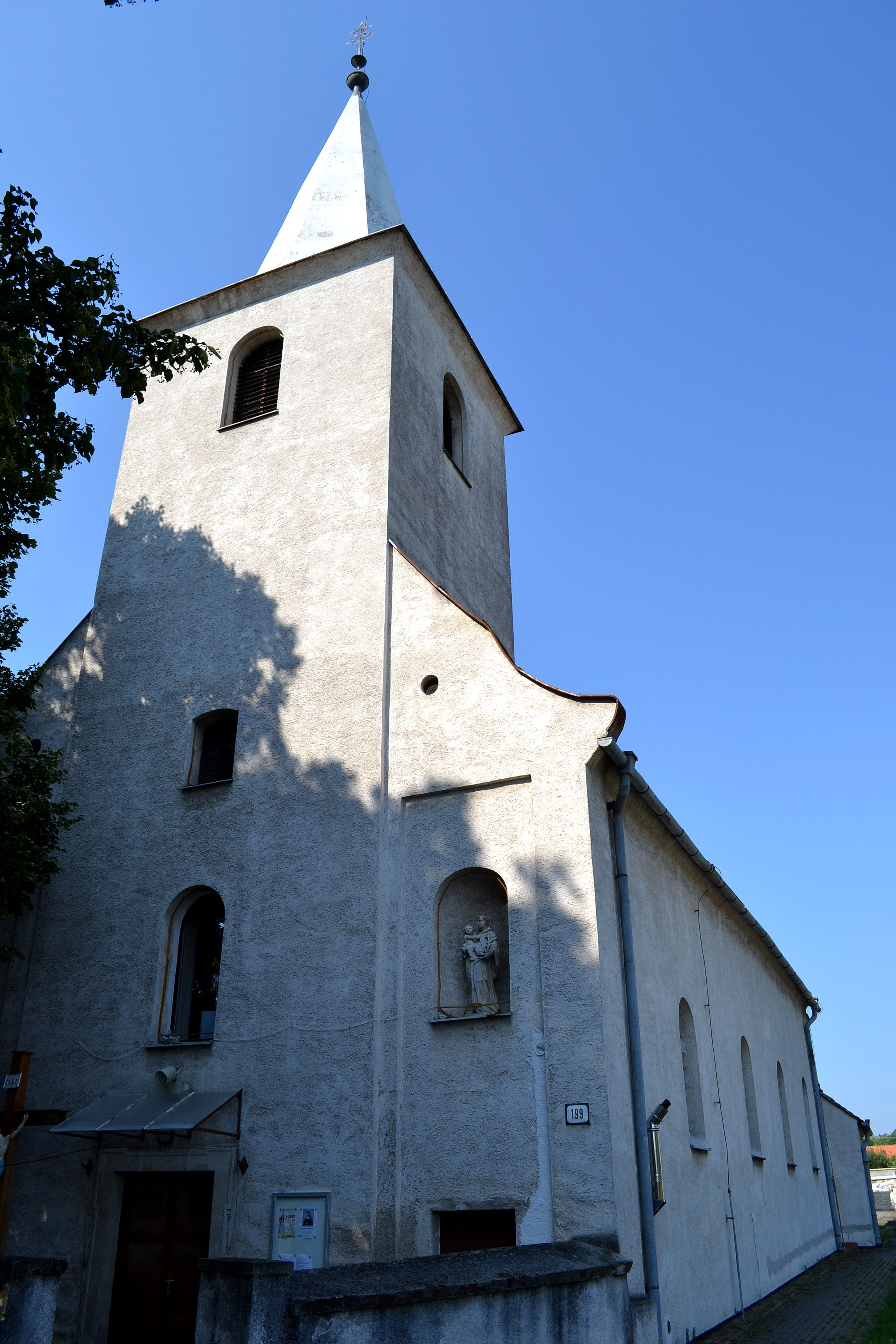 Kátlovce (okr. Trnava), Kostol svätého Ducha; hlavné priečelie